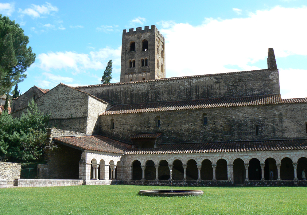 Klášter Saint-Michel de Cuxa